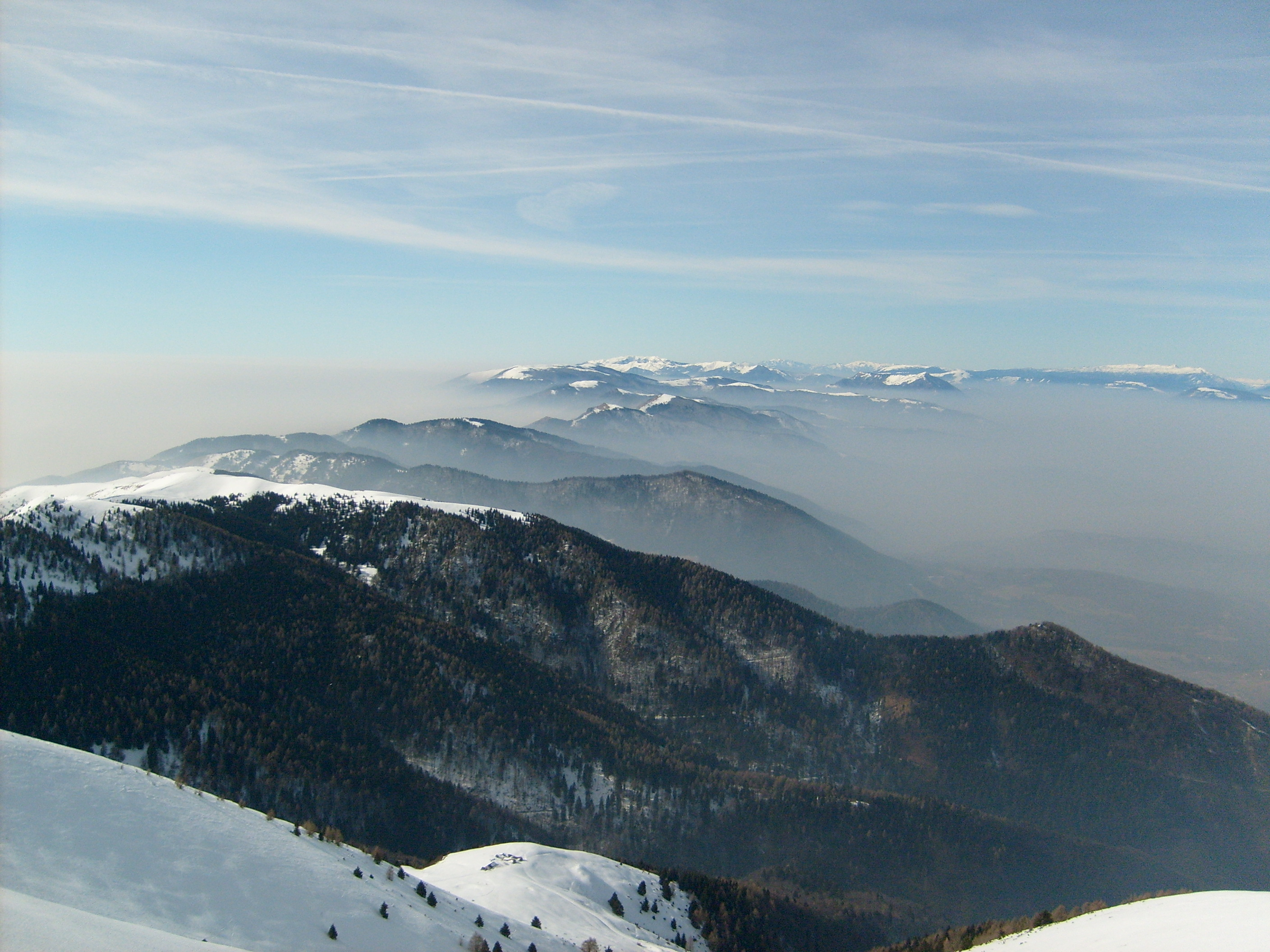 Inversione termica nel trevigiano e nel bellunese, viste dal Col Visentin